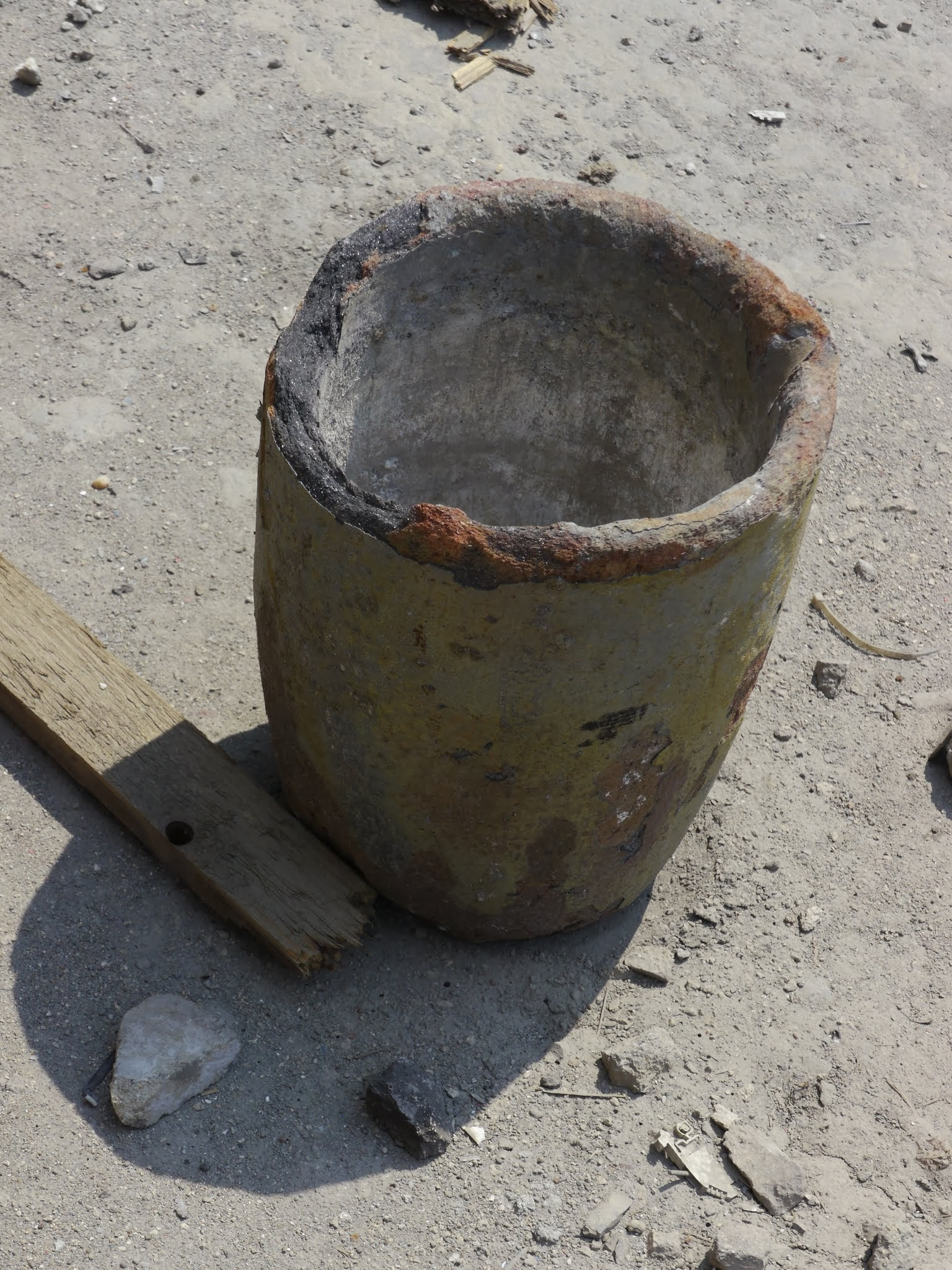 Metall-Gusstiegel